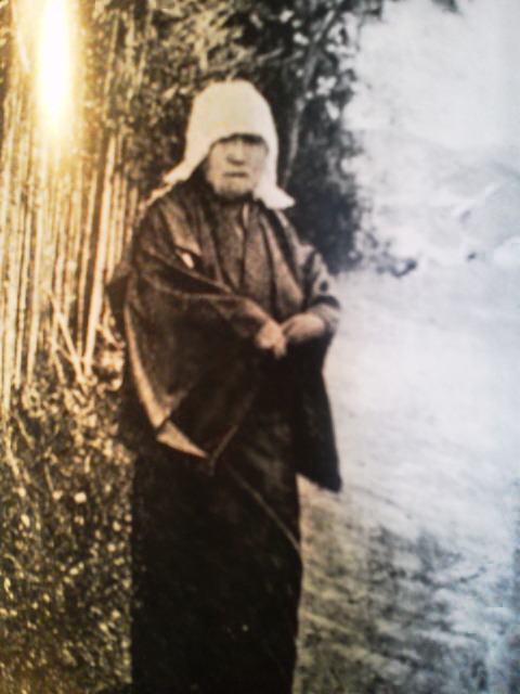 天理教を訪れた後